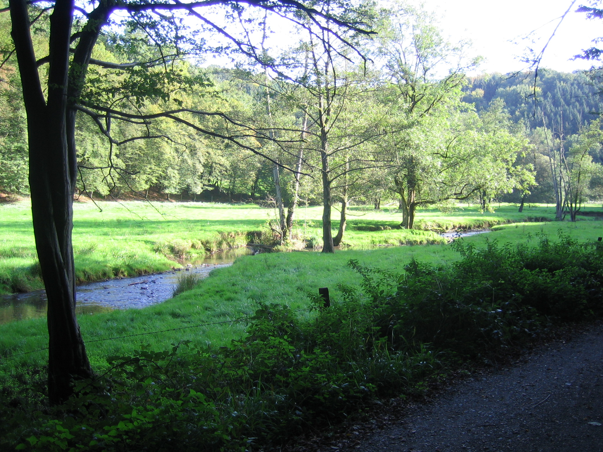 Aue des Naafbaches irgendwo im Rhein-Sieg-Kreis oder im Rheinisch-Bergischen Kreis, Nordrhein-Westfalen